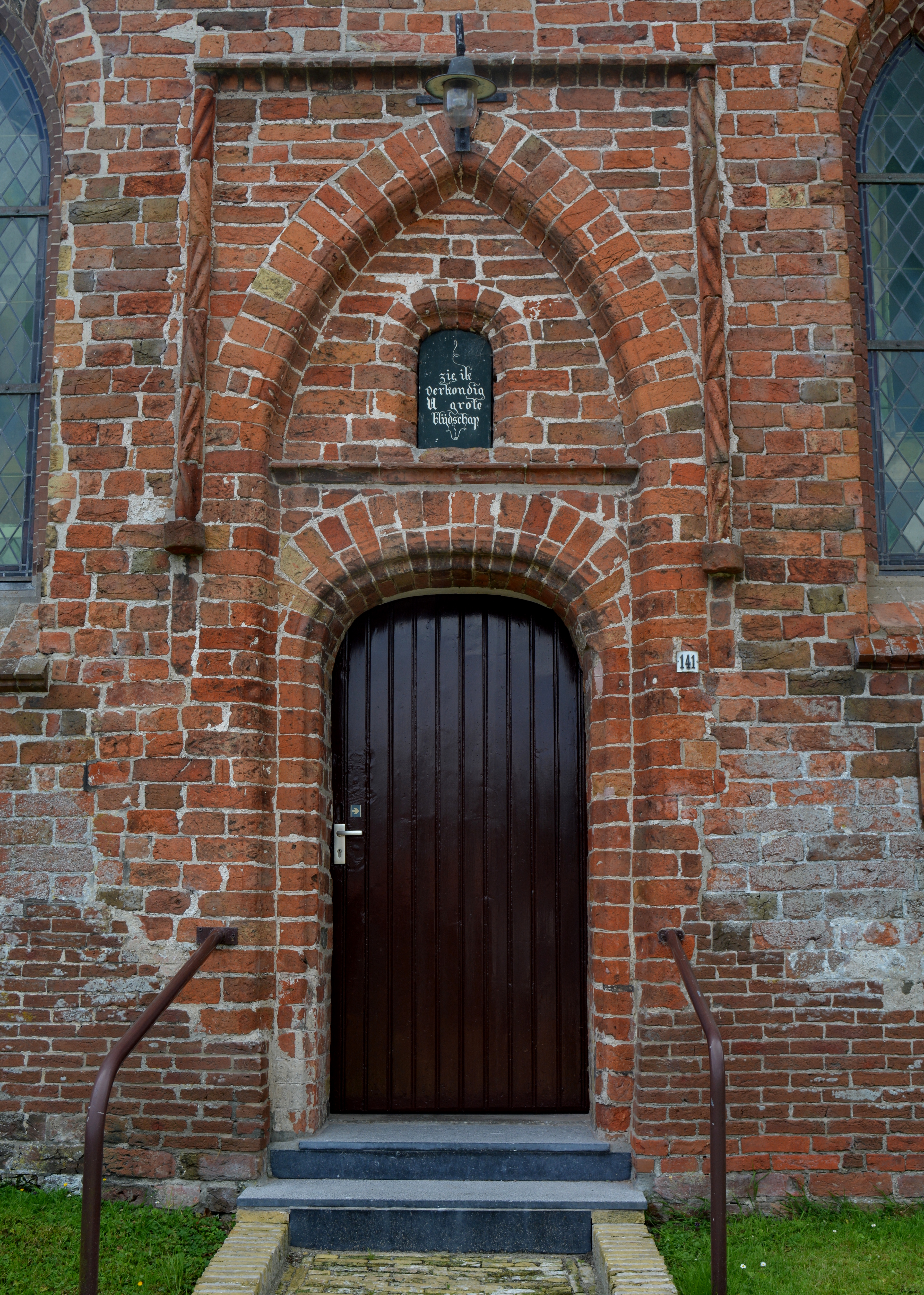 Kollumerzwaag, herv. kerk, noordelijk portaal